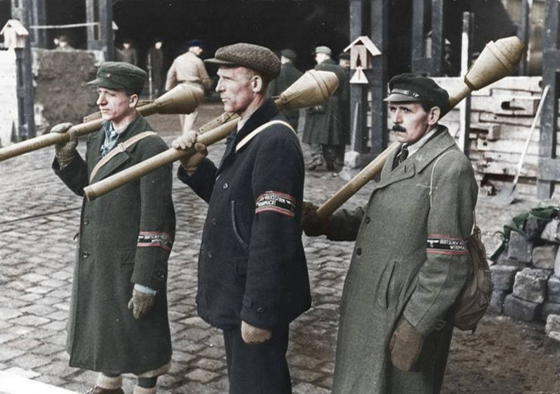 This is a retouched picture, which means that it has been digitally altered from its original version. Modifications: recolored. The original can be viewed here: Bundesarchiv Bild 183-J31320, Berlin, Posten beim Bau einer Straßensperre.jpg: . Modifications made by Ruffneck88. Photographer UnknownOriginal caption Berlin, Posten beim Bau einer Straßensperre ADN-ZB/Archiv Das faschistische Deutschland im II. Weltkrieg 1939-45 Berlin wird am 1. Februar 1945 zum "Verteidigungsbereich" erklärt. Es werden Barrikaden errichtet, Stellungen und Panzergräben ausgehoben. Drei Volkssturmsoldaten mit Panzerfäusten stehen am 10. März auf Posten beim Bau einer Straßensperre an einer Bahnunterführung. 343-45 [Scherl Bilderdienst]Depicted place BerlinDate 10 March 1945date QS:P571,+1945-03-10T00:00:00Z/11Collection German Federal Archives Native nameDas BundesarchivLocationKoblenz (headquarters)Coordinates50° 20′ 32.71″ N, 7° 34′ 21.22″ E Established1946Web page control : Q685753 VIAF: 137346469 ISNI: 0000 0004 0555 2728 LCCN: n92025526 NLA: 36455393 Open Library: OL55798A WorldCat institution QS:P195,Q685753Current location Allgemeiner Deutscher Nachrichtendienst - Zentralbild (Bild 183)Accession number Bild 183-J31320 Source This image was provided to Wikimedia Commons by the German Federal Archive (Deutsches Bundesarchiv) as part of a cooperation project. The German Federal Archive guarantees an authentic representation only using the originals (negative and/or positive), resp. the digitalization of the originals as provided by the Digital Image Archive. Berlin, Posten beim Bau einer Straßensperre ADN-ZB/Archiv Das faschistische Deutschland im II. Weltkrieg 1939-45 Berlin wird am 1. Februar 1945 zum "Verteidigungsbereich" erklärt. Es werden Barrikaden errichtet, Stellungen und Panzergräben ausgehoben. Drei Volkssturmsoldaten mit Panzerfäusten stehen am 10. März auf Posten beim Bau einer Straßensperre an einer Bahnunterführung. 343-45 [Scherl Bilderdienst]